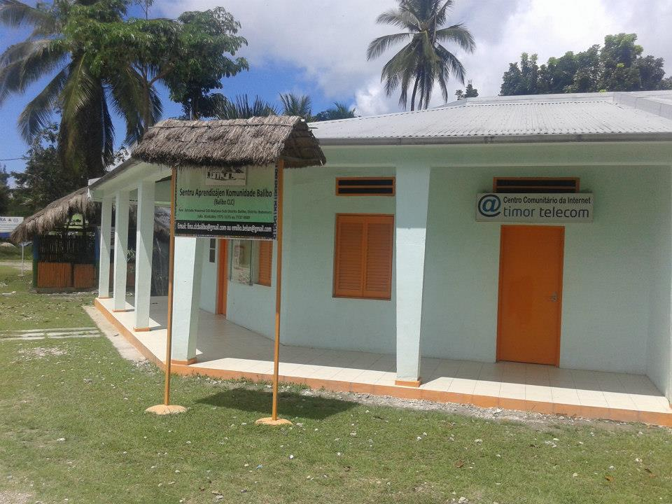 Casa Museu de Homenagem aos 5 Jornalistas mortos em Balibo durante a invasão de 1975